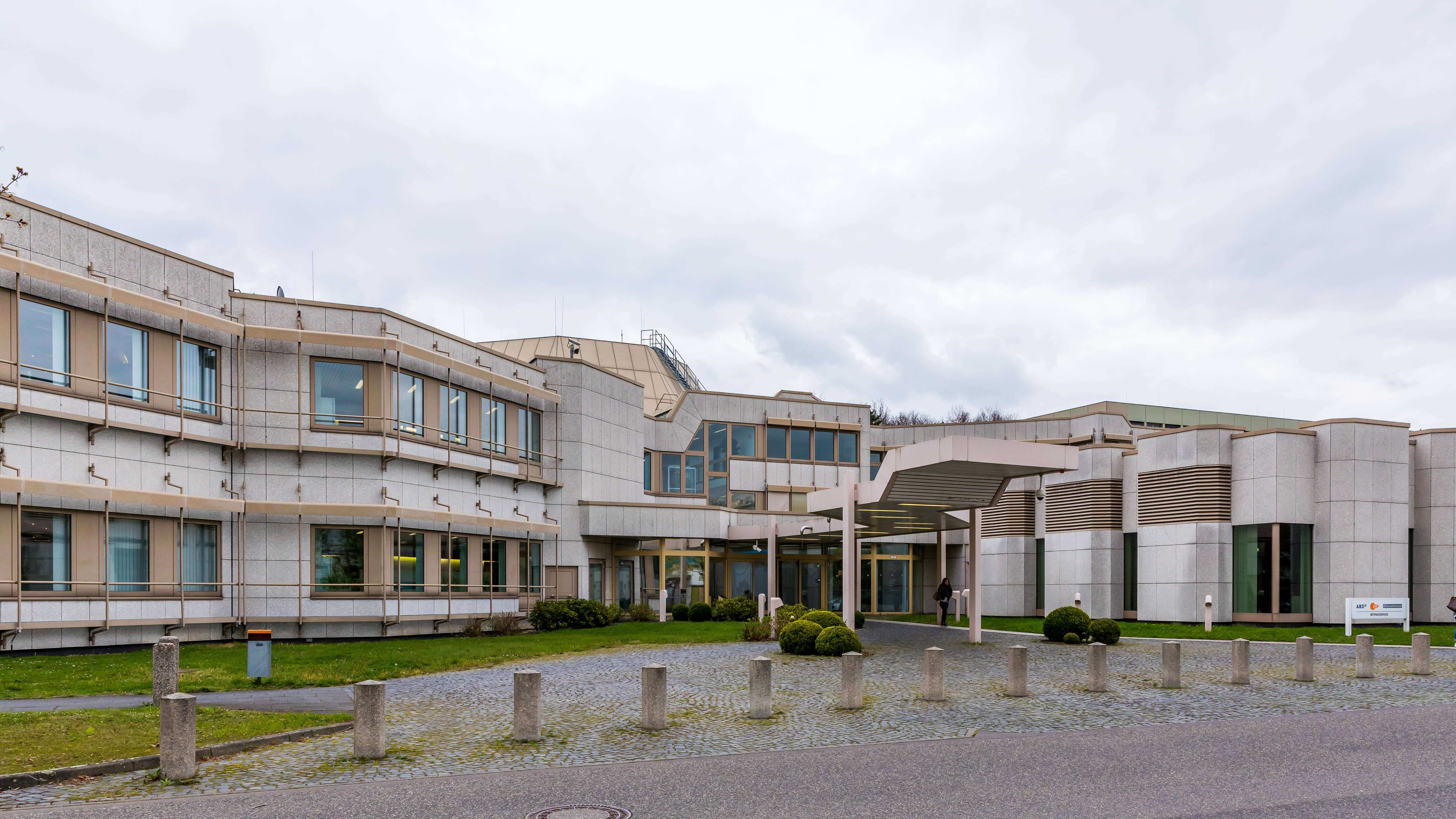 Bürogebäude des ARD ZDF Deutschlandradio Beitragsservice auf dem WDR-Produktionsgeländer Köln-Bocklemünd